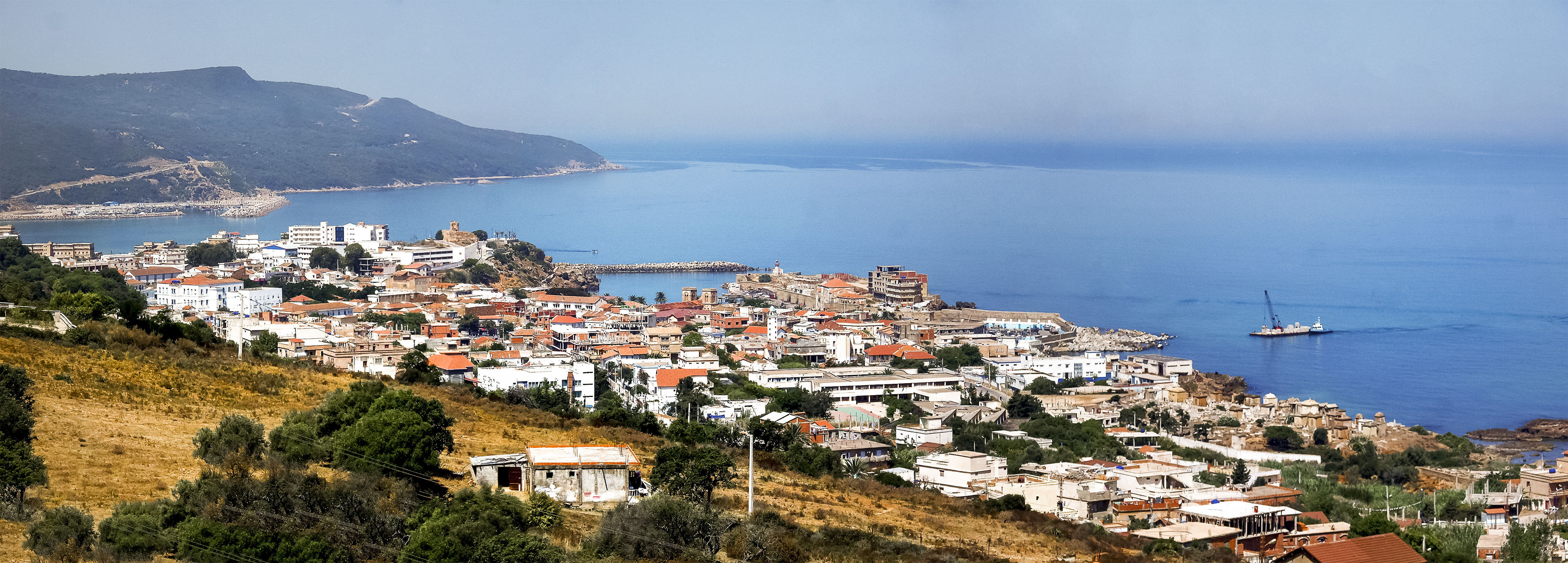 Vue sur El Kala - wilaya d'El Tarf منظر لمدينة القالة - ولاية الطارف